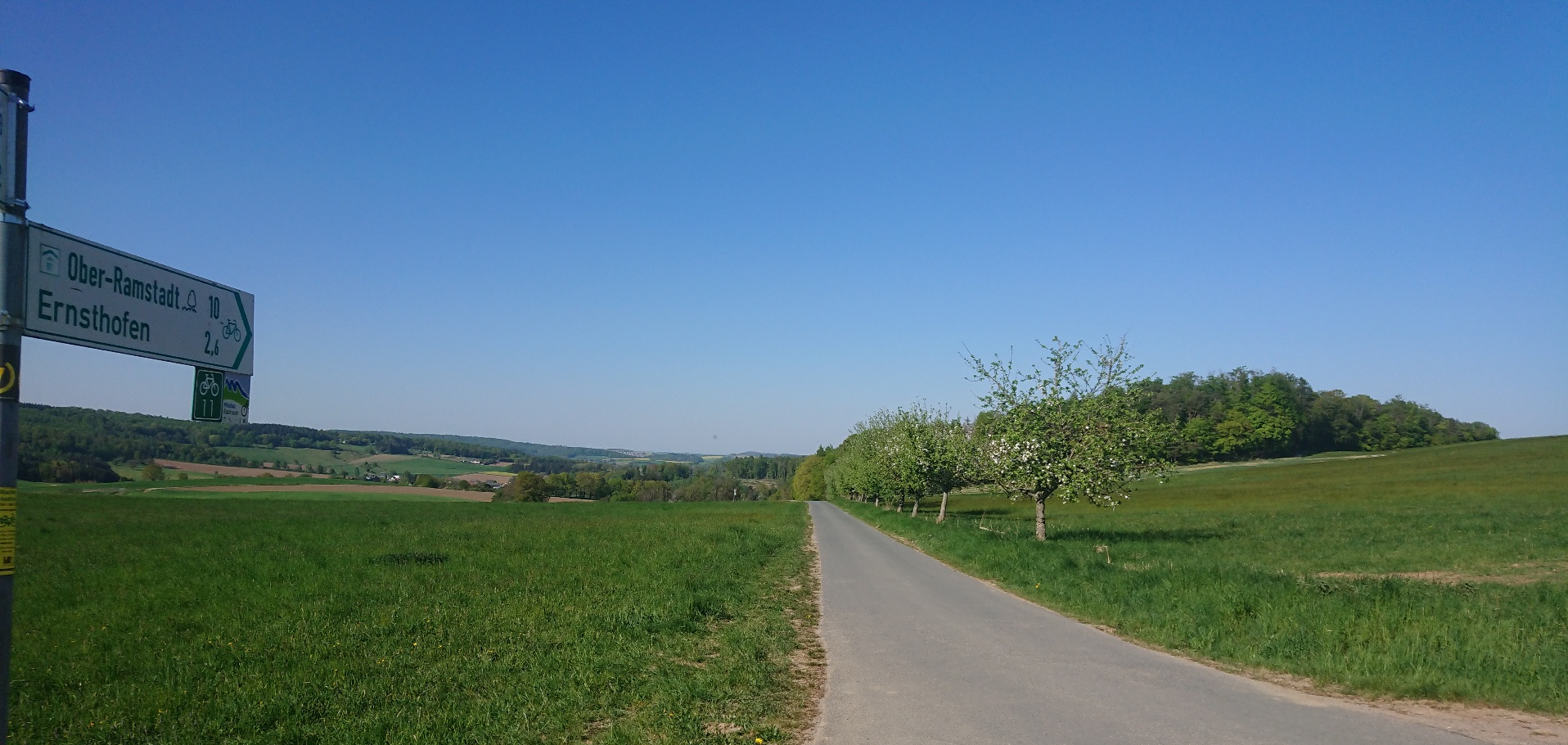 Modau-Radweg zwischen Brandau und Herchenrode